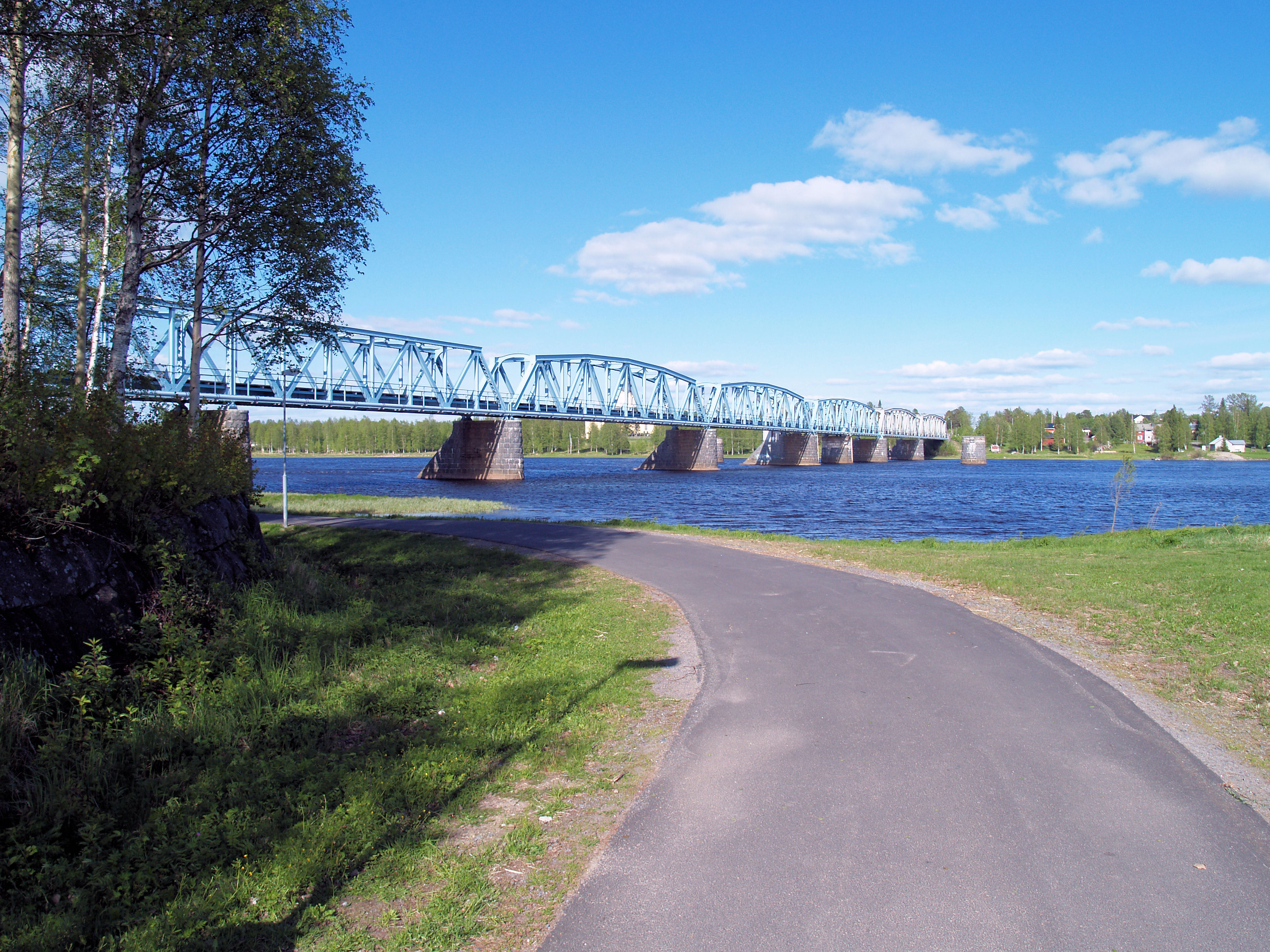 Einenbahnbrücke über den Torne älv. Grenzbrücke zwischen Haparanta und Torino. Sicht auf die Brücke von schwedischen Ufer